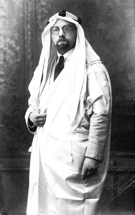 Jacob Israel de Haan (1881-1924), in Palestine, dressed like an Arab